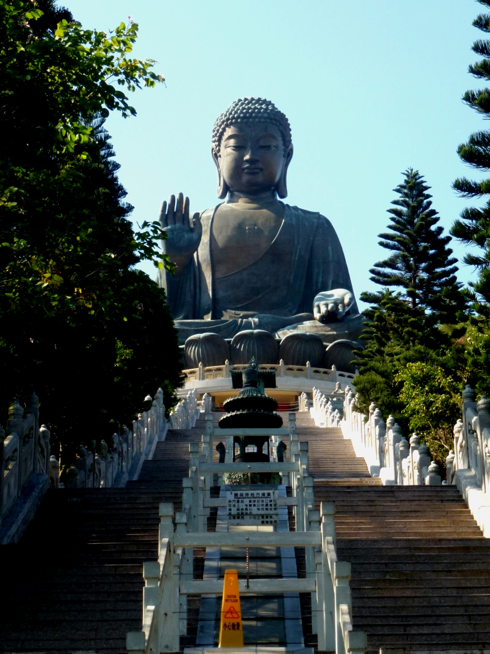 Tian Tan Buddha Lantau Island Hong Kong